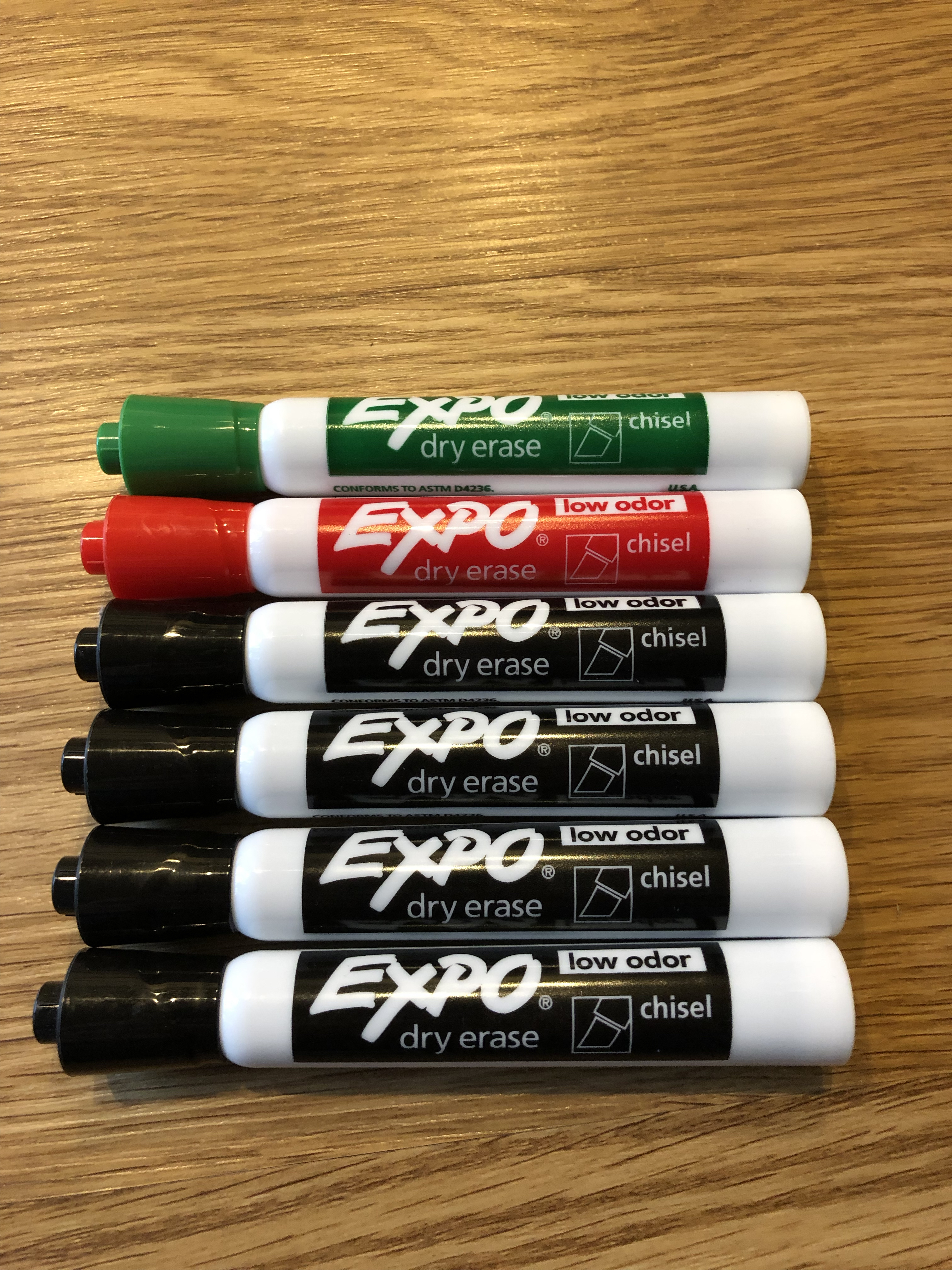 Expo markers